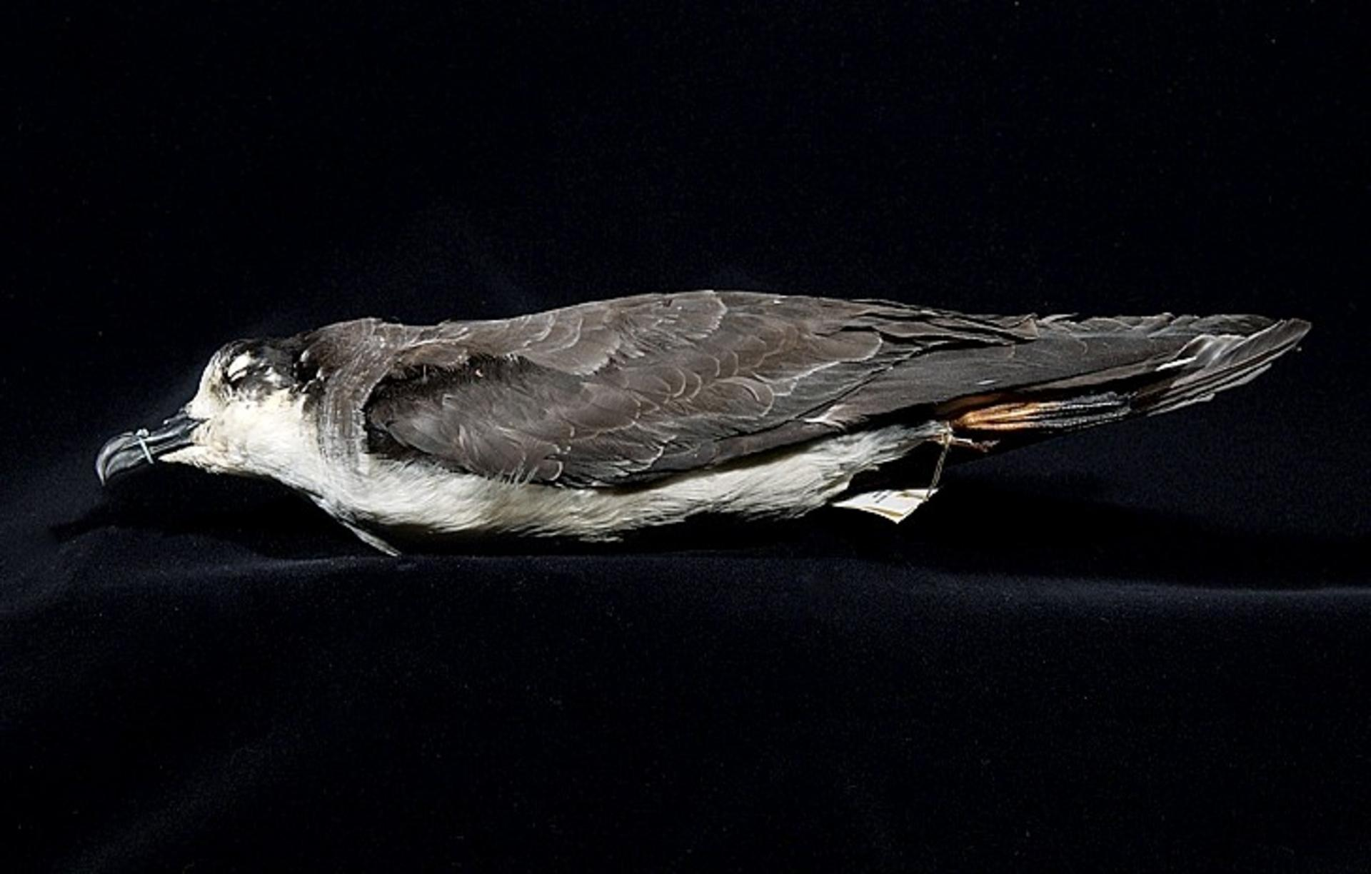 Pterodroma phaeopygia phaeopygia Salvin, 1876